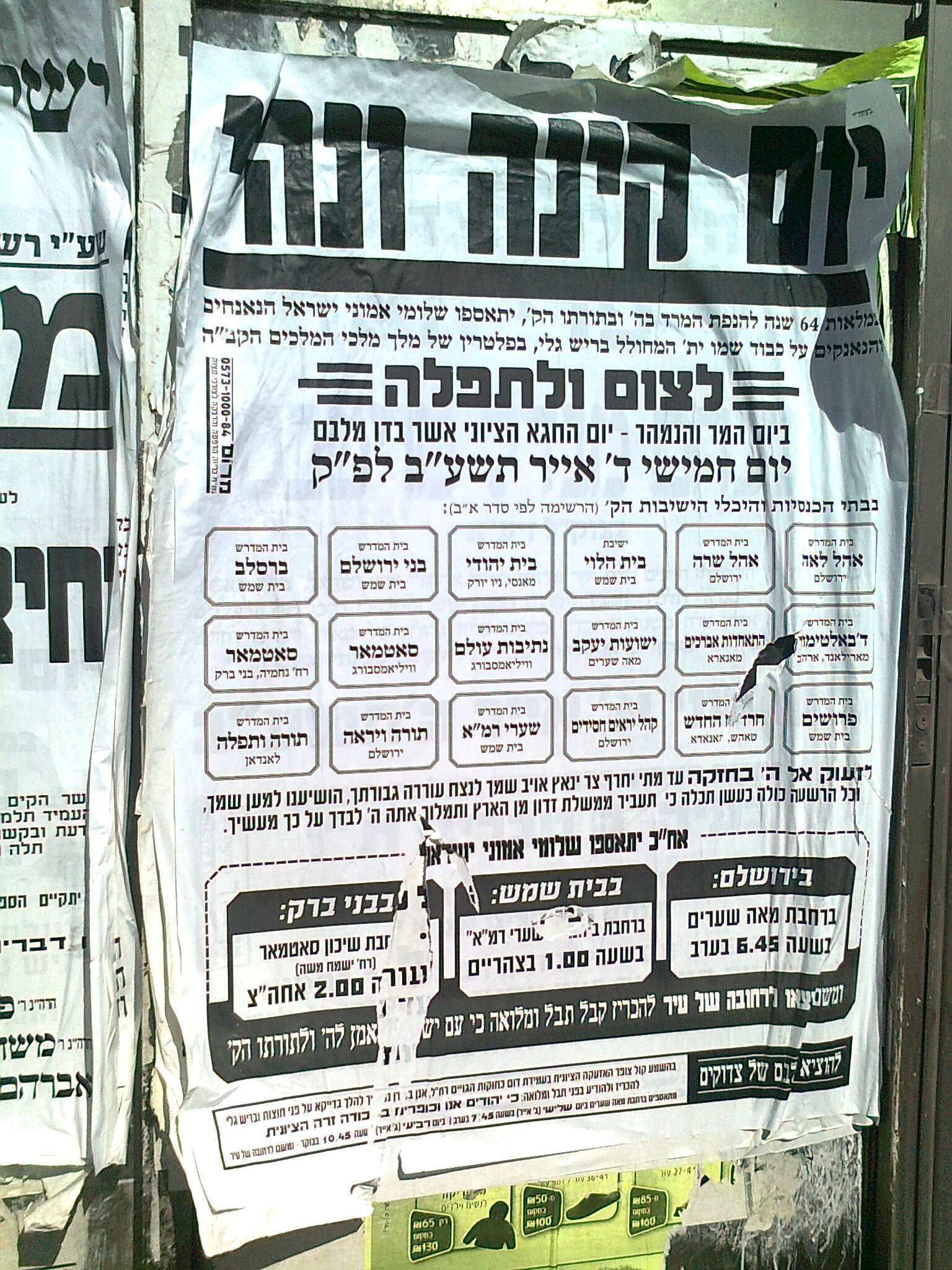 פשקויל הקורא לצום ולתפלה ו"ליום קינה ונהי" ביום העצמאות תשע"ב.